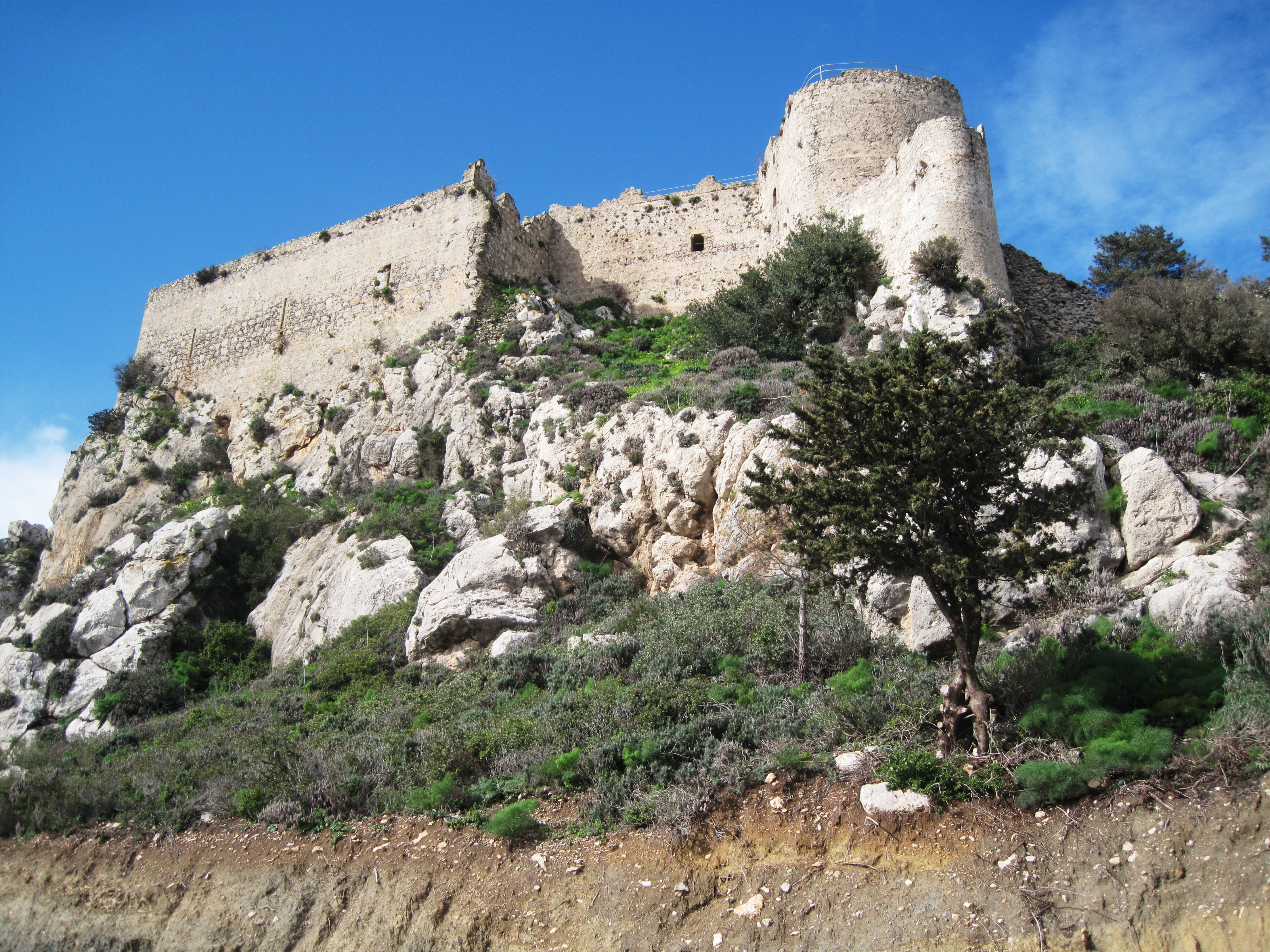 Kantara kasteel Cyprus